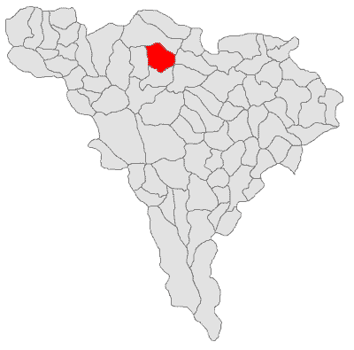 Categorie:Hărţi ale judeţului Alba